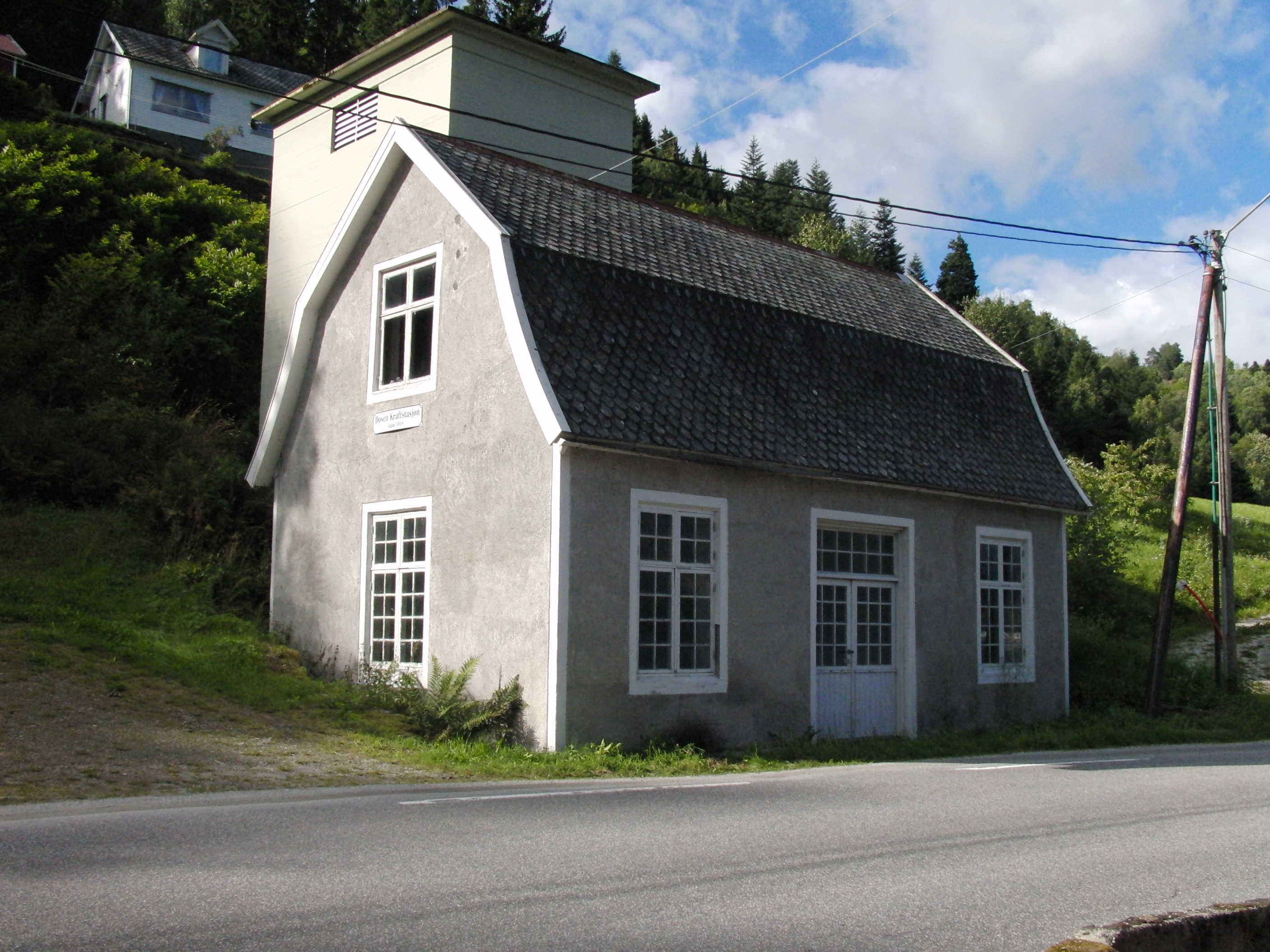 Døsen Kraftstasjon. 1915 - 1979